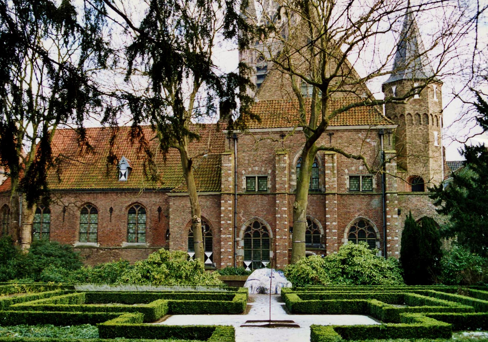 't Prinsenhof te Delft.